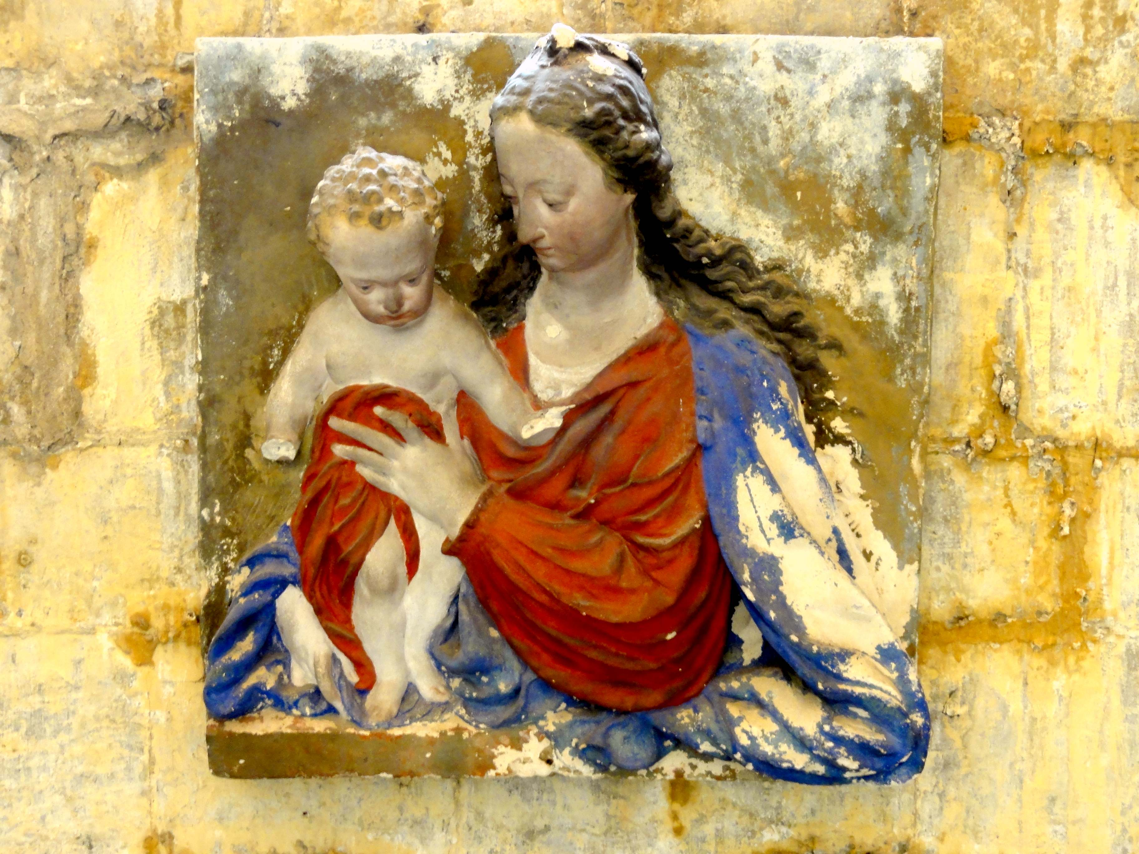 Bas-relief - La Charité.